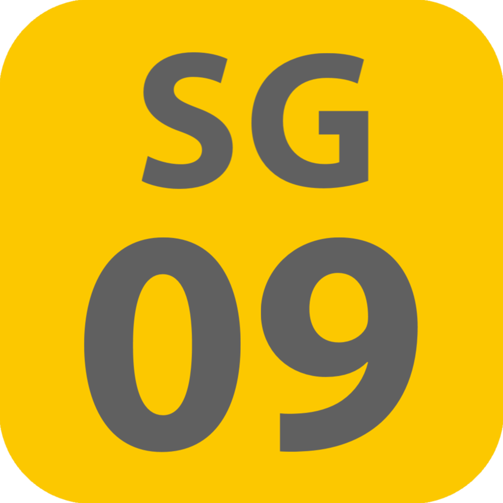 世田谷線の松原の駅ナンバリング記号